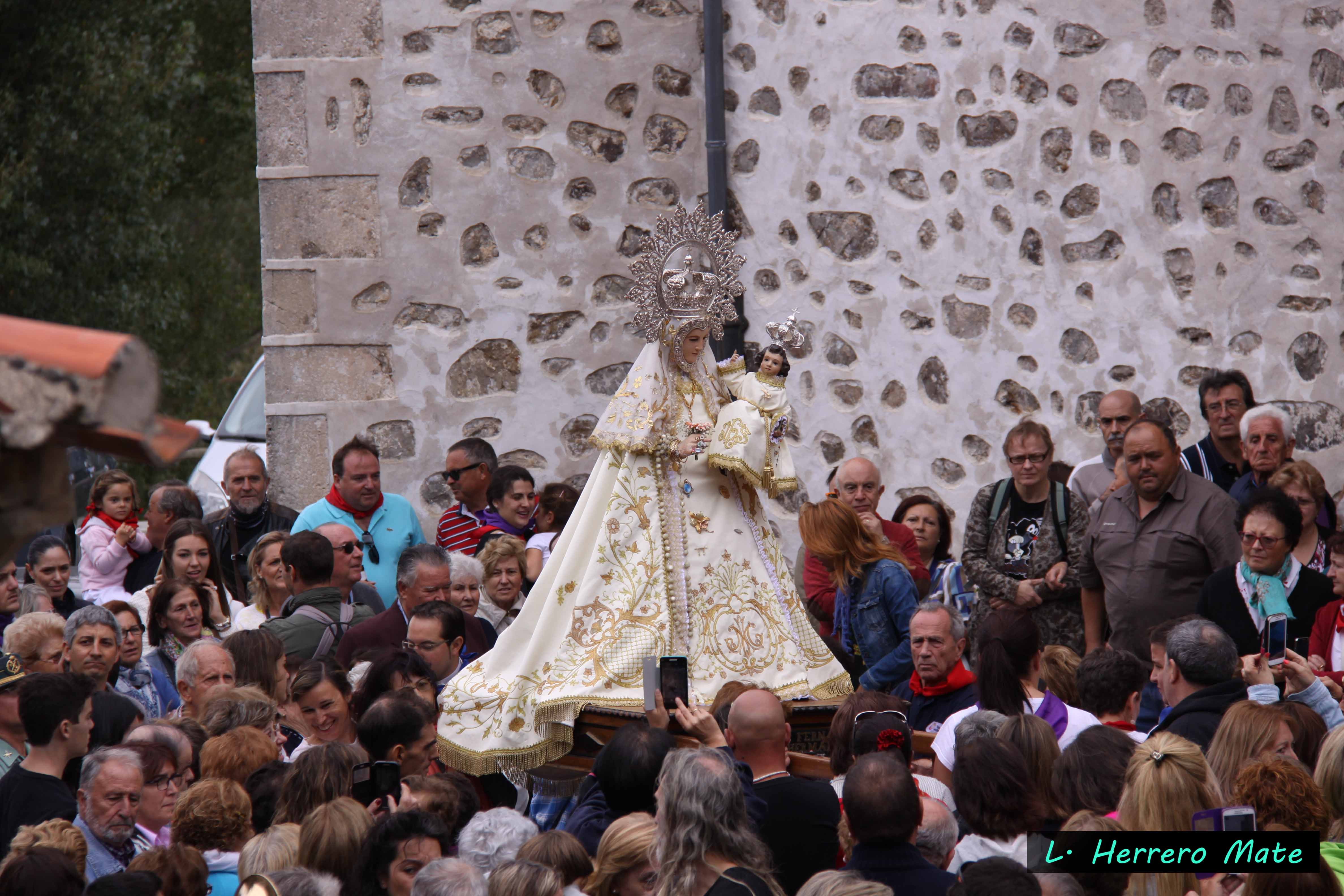 Momento de la procesión de Nuestra Señora de Hontanares por los alrededores de su ermita